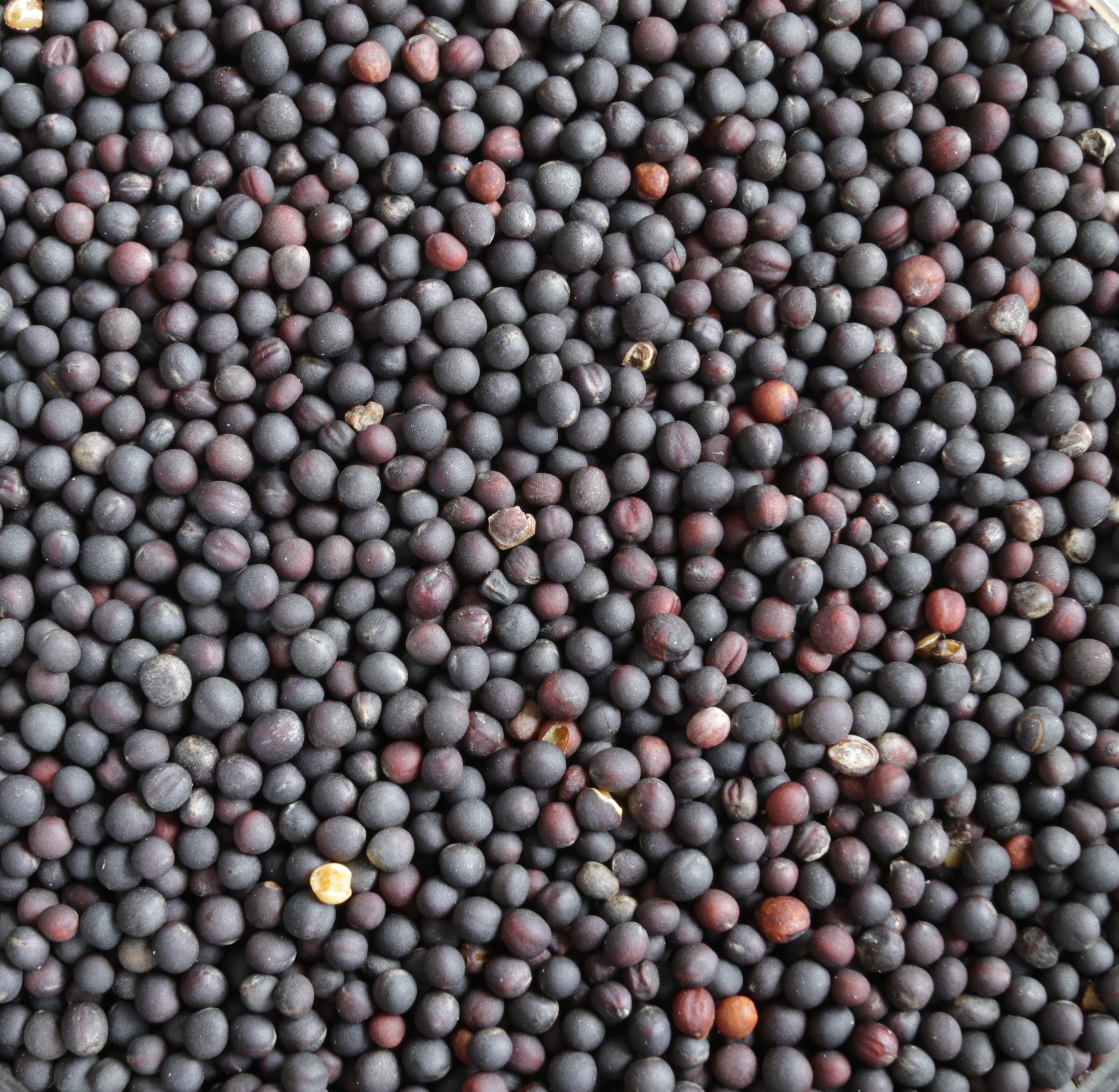 Rostade rapsfrö